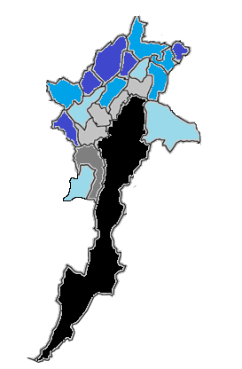 Influencia Máx. Negro; Influencia Mín. Azul